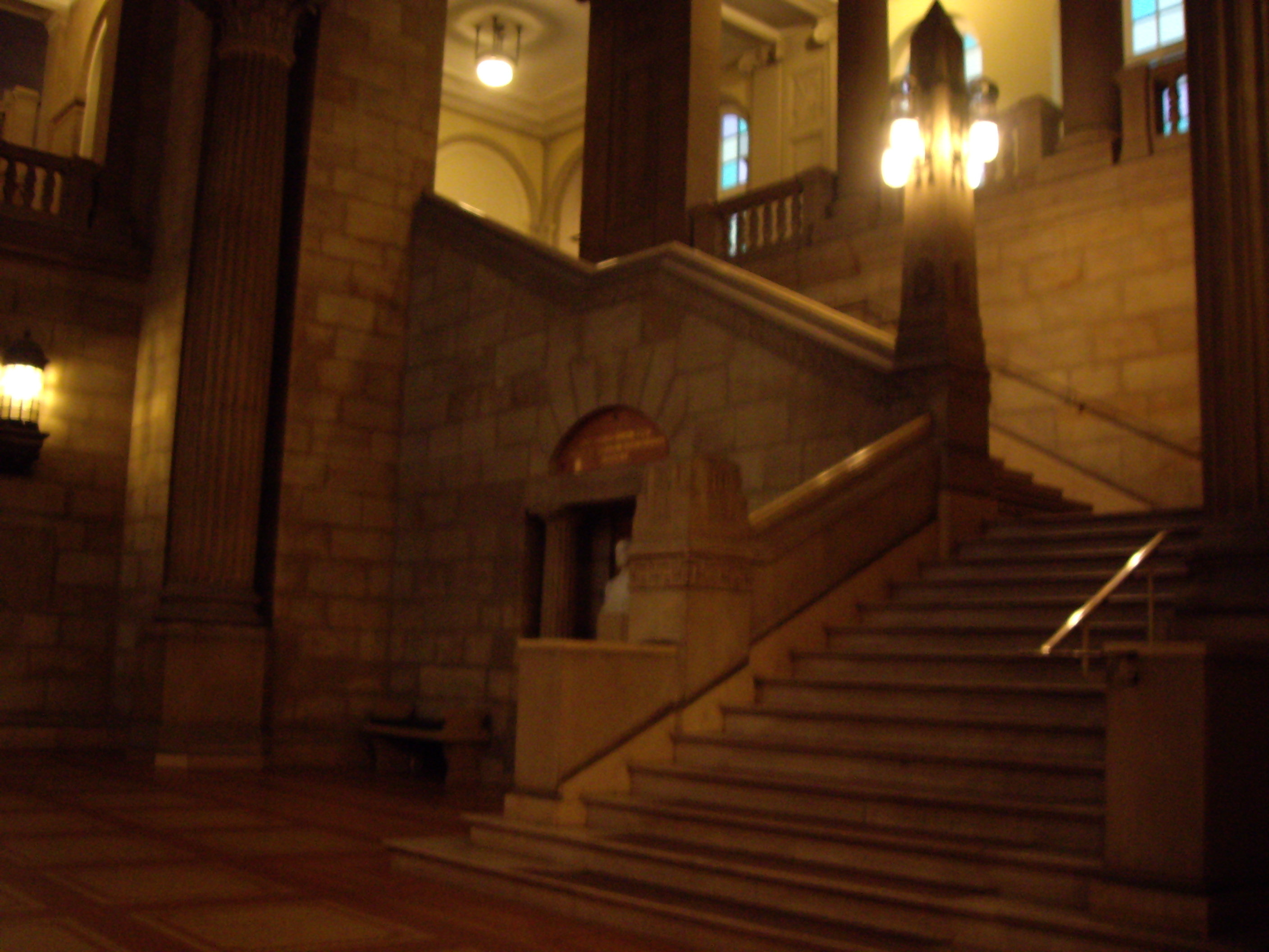 Treppe in der Eingangshalle des Oberlandesgerichtsgebäudes Hamburg